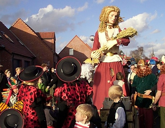 EPONA géant du quartier des Près Villeneuve-d'Ascq, Nord.- France, lors de la célébration de son mariage civil et républicain avec Guillem le Contrebandier le géant de (Willems)